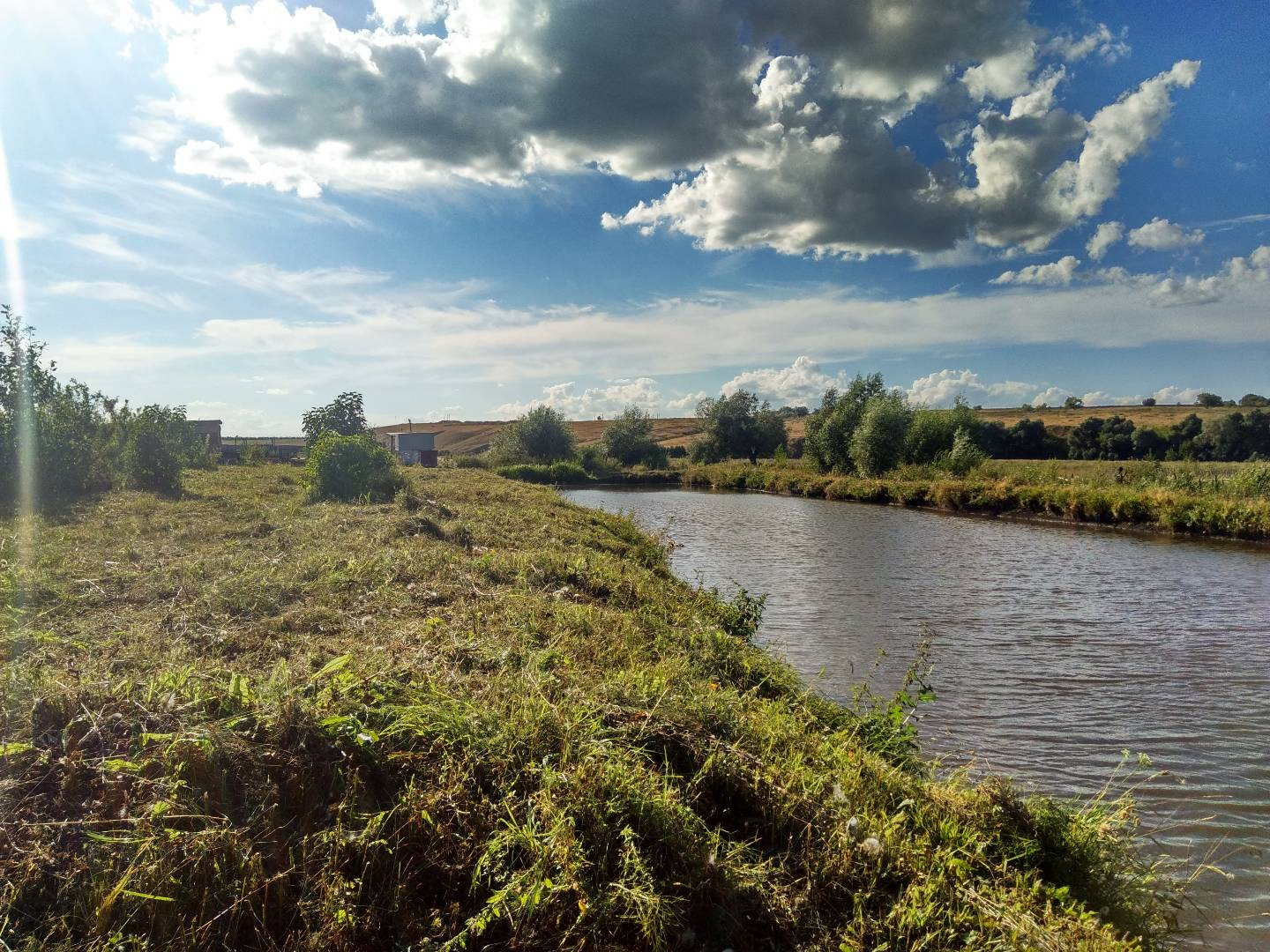 Озеро Картлар елгасы